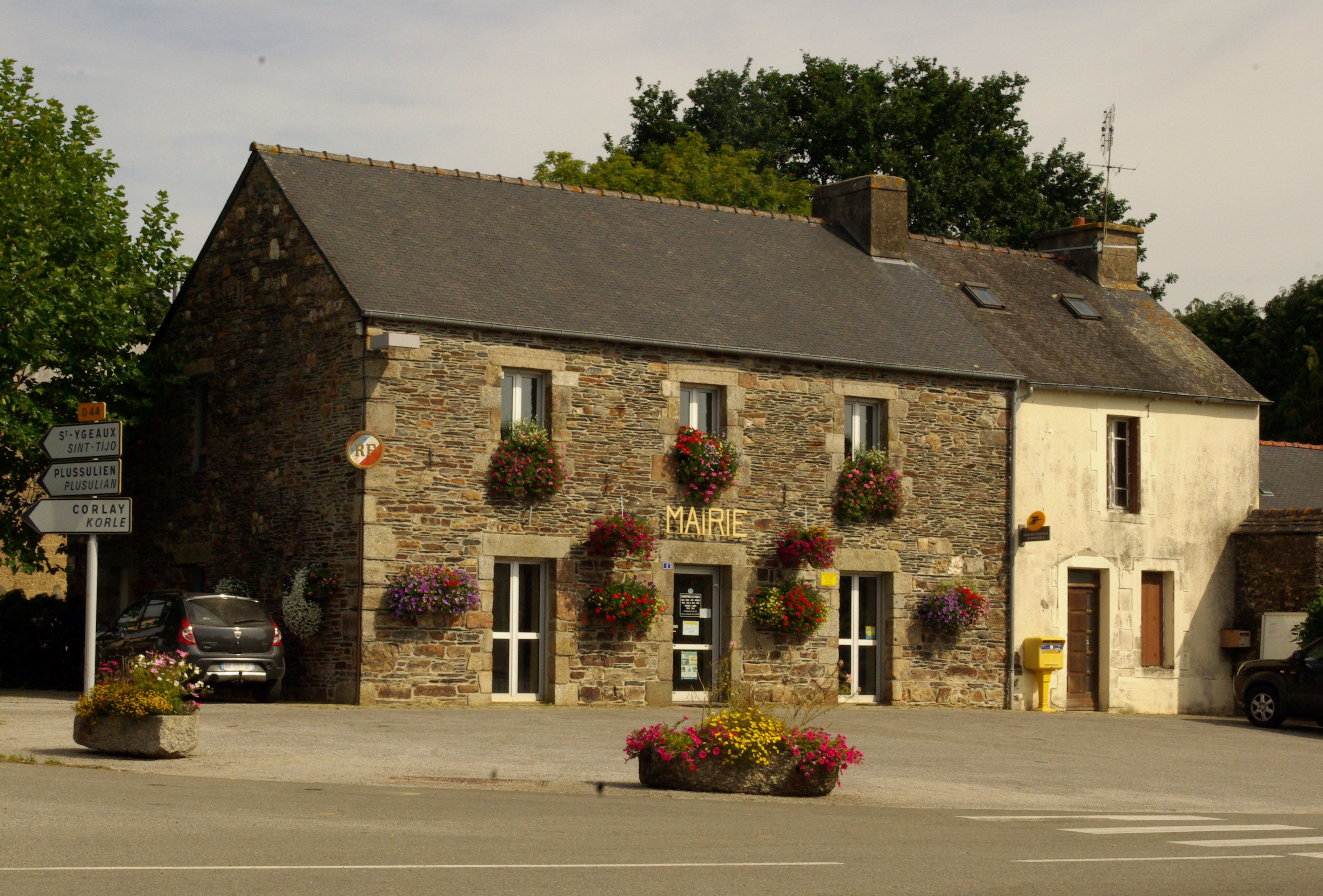 Mairie de Laniscat